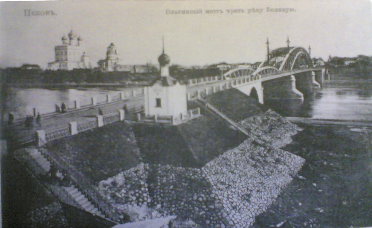 Ольгинский мост в Пскове около 1911 года